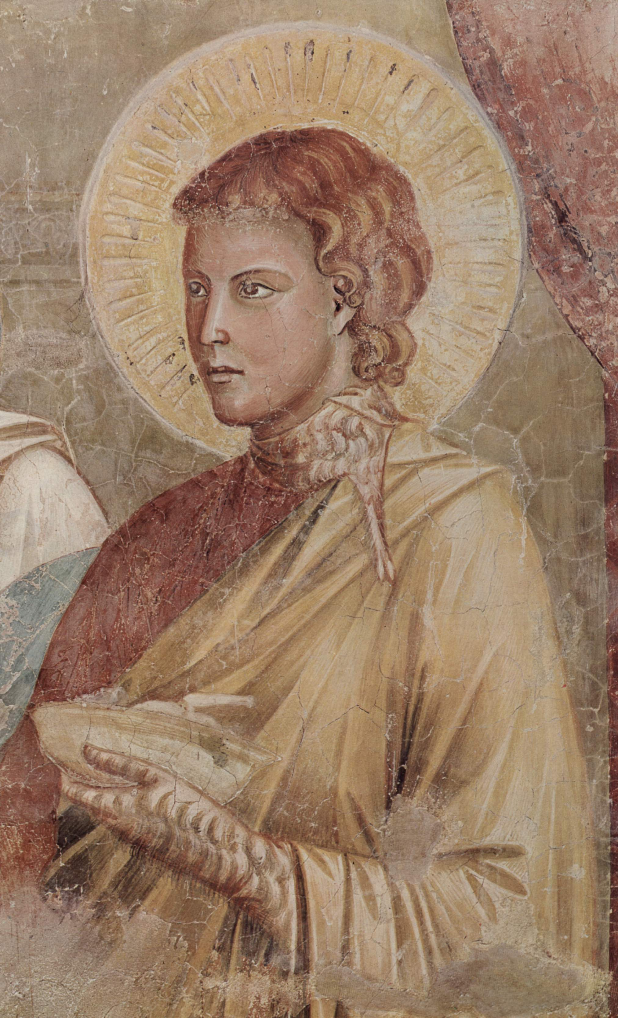 Freskenzyklus zum Leben des Hl. Franziskus von Assisi